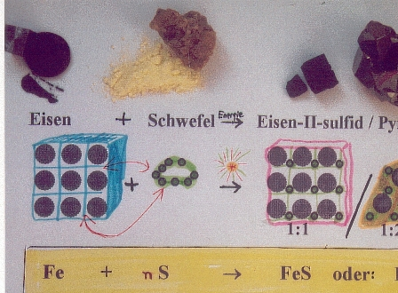 Eisen und Schwefel bilden Eisensulfide, mit Reaktionsschema